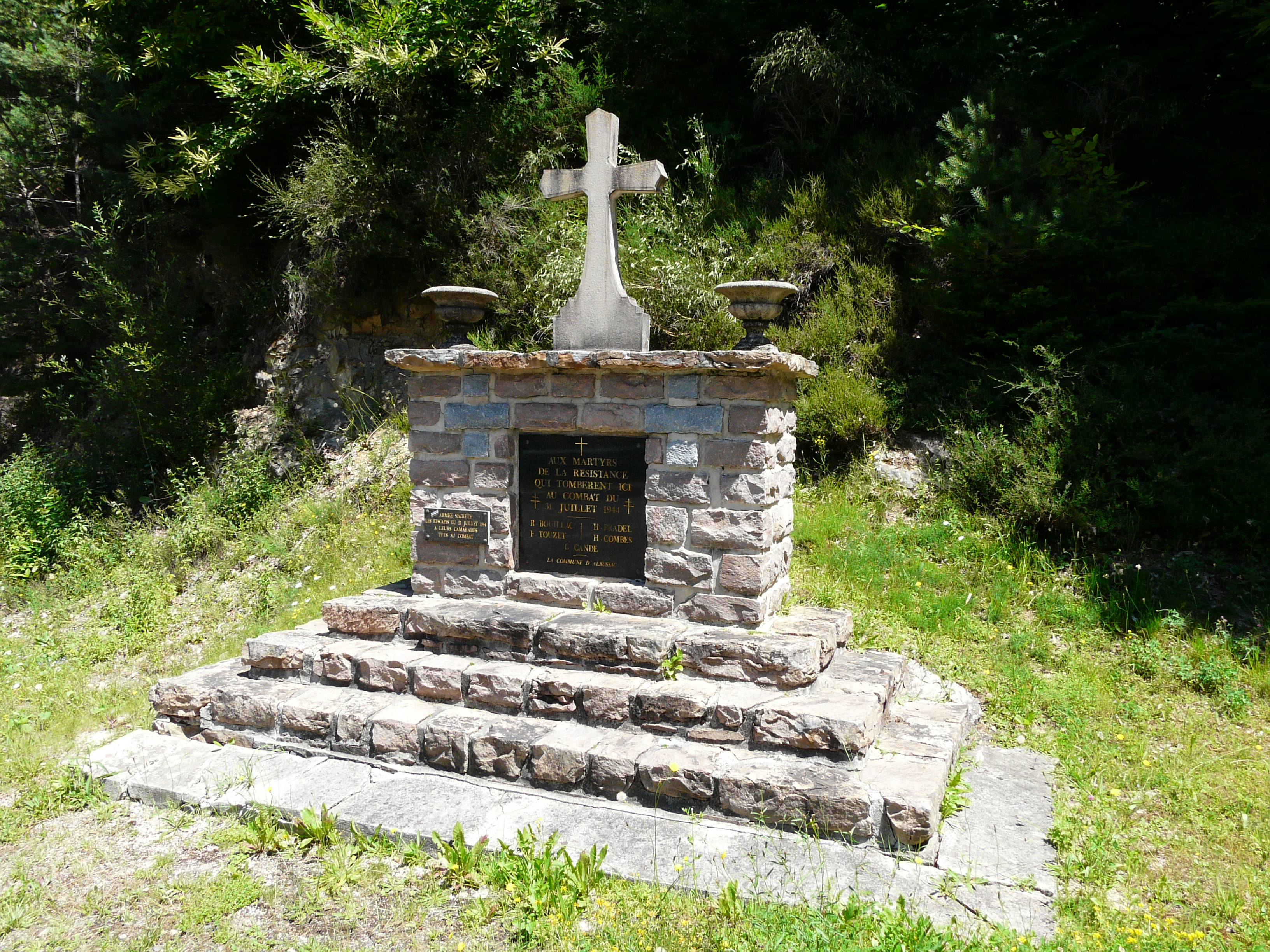 Au bord de la route départementale 921, la stèle commémorant le combat du 31 juillet 1944, Albussac, Corrèze, France.